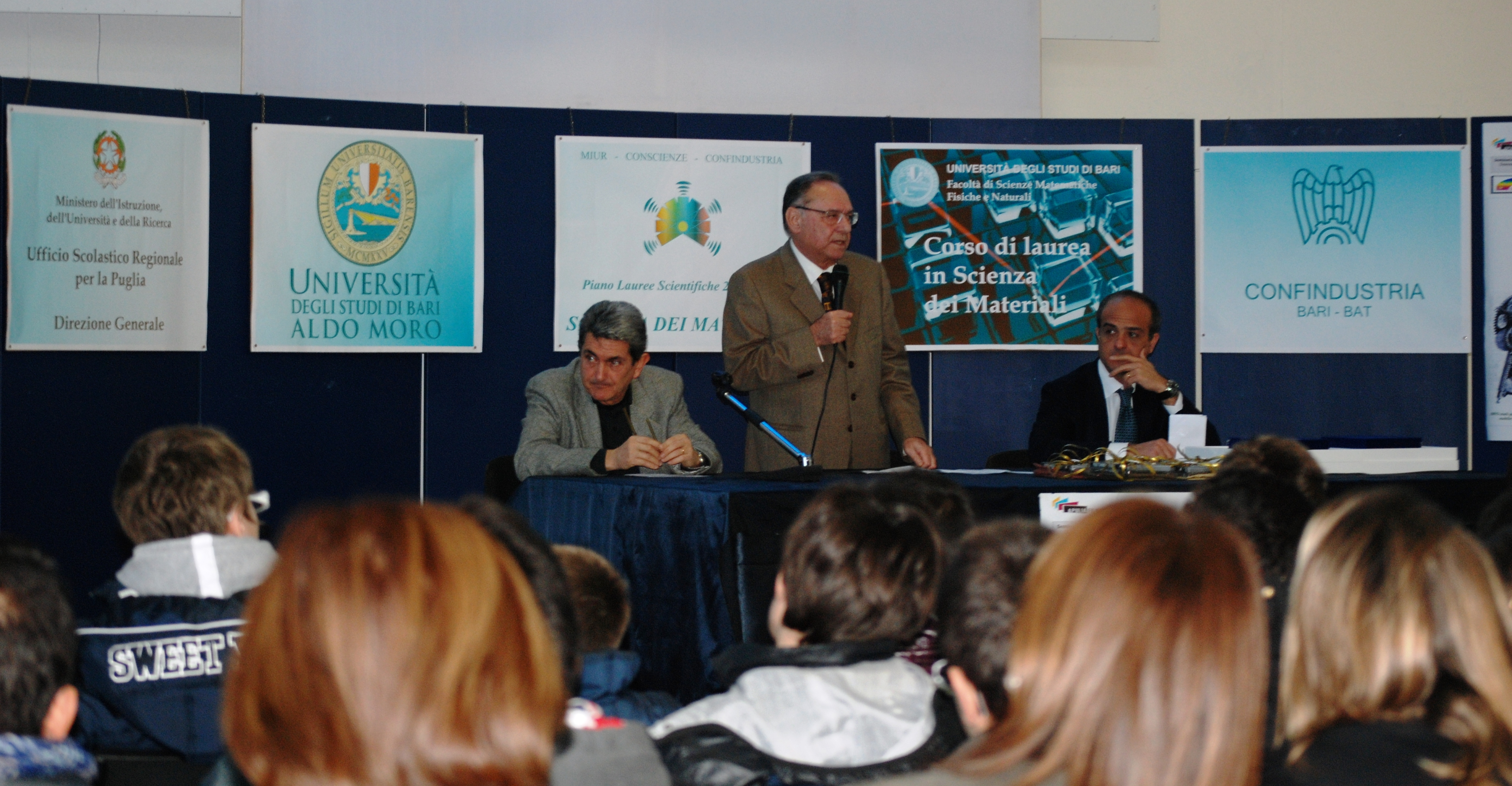 Digital storytelling 2011